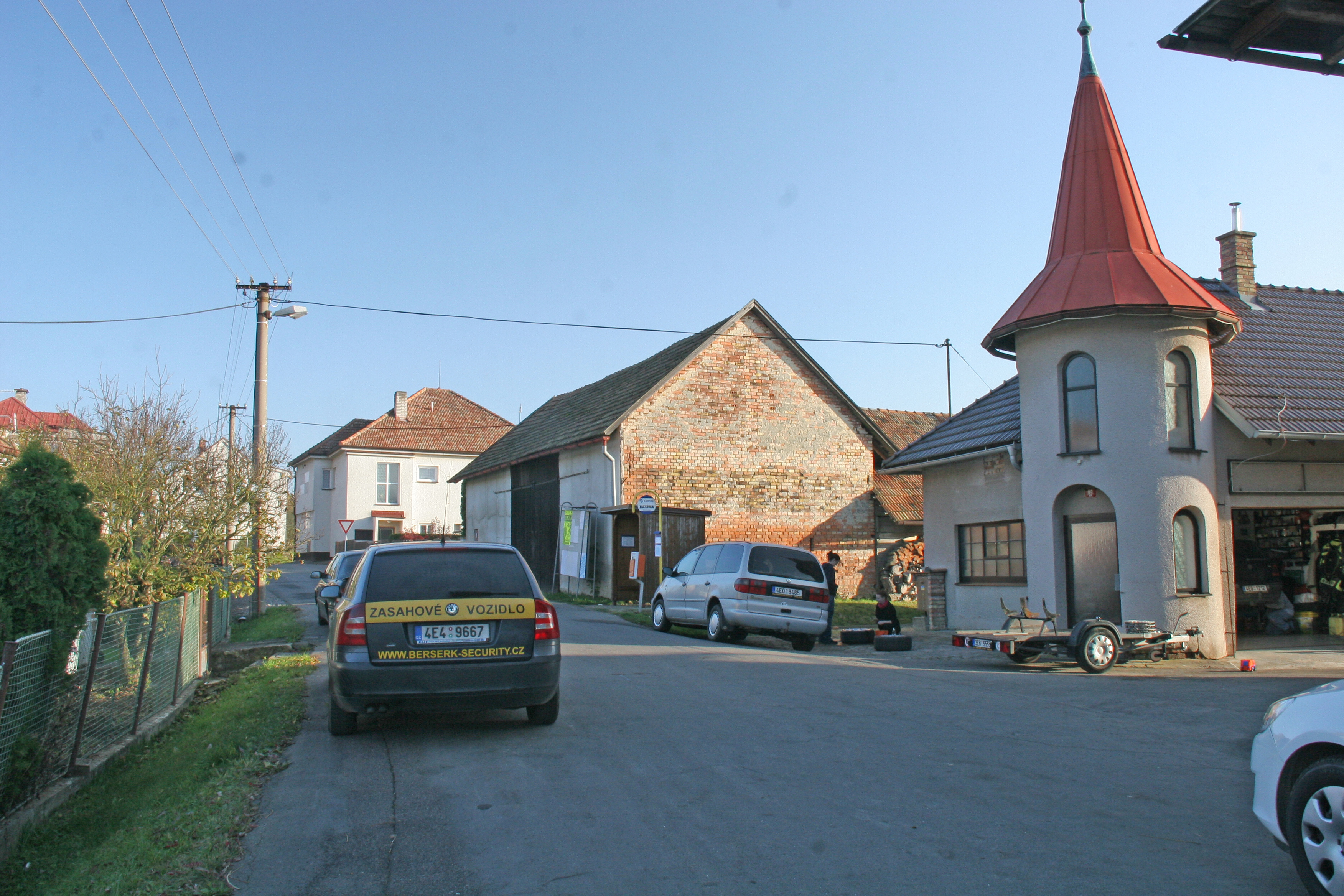 Koudelka čp. 50